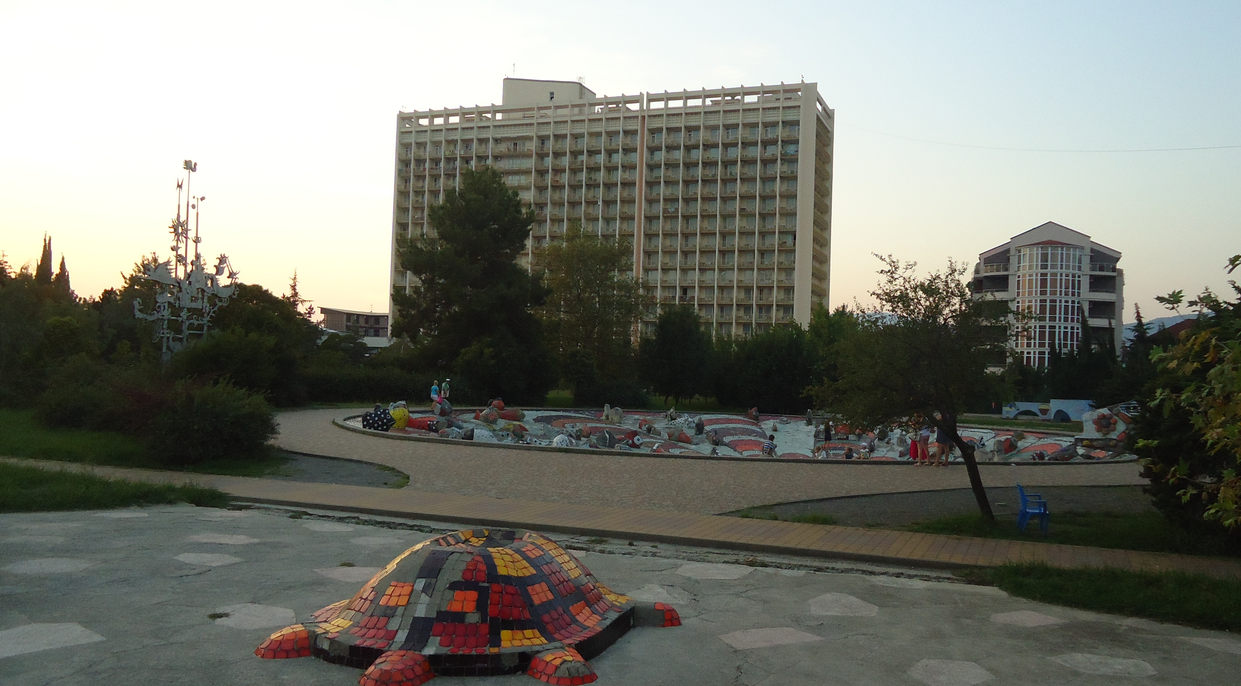 Адлерский Курортный городок